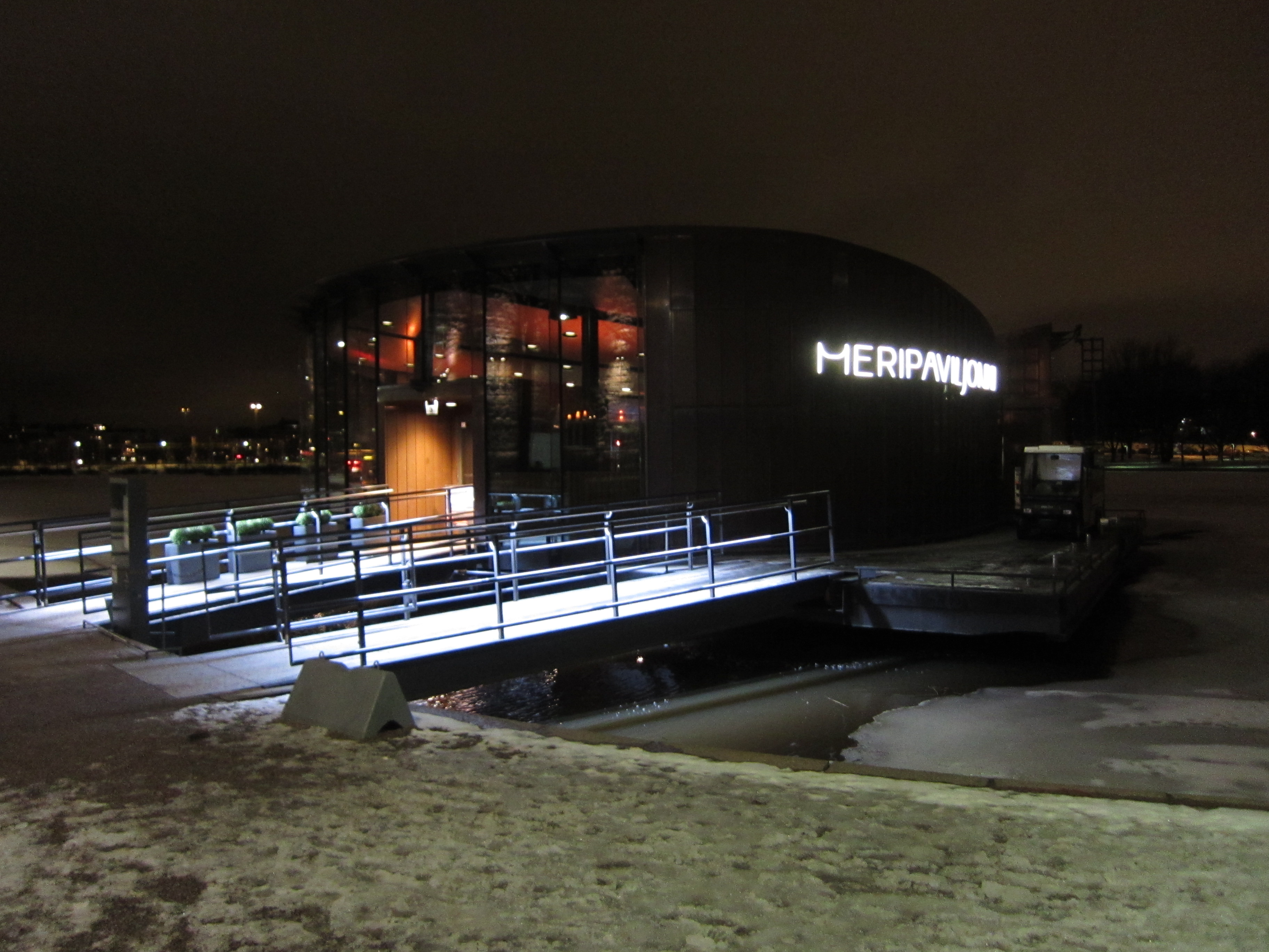 Restaurant Meripaviljonki, Säästöpankinranta 3, 00530 Helsinki, Finnland